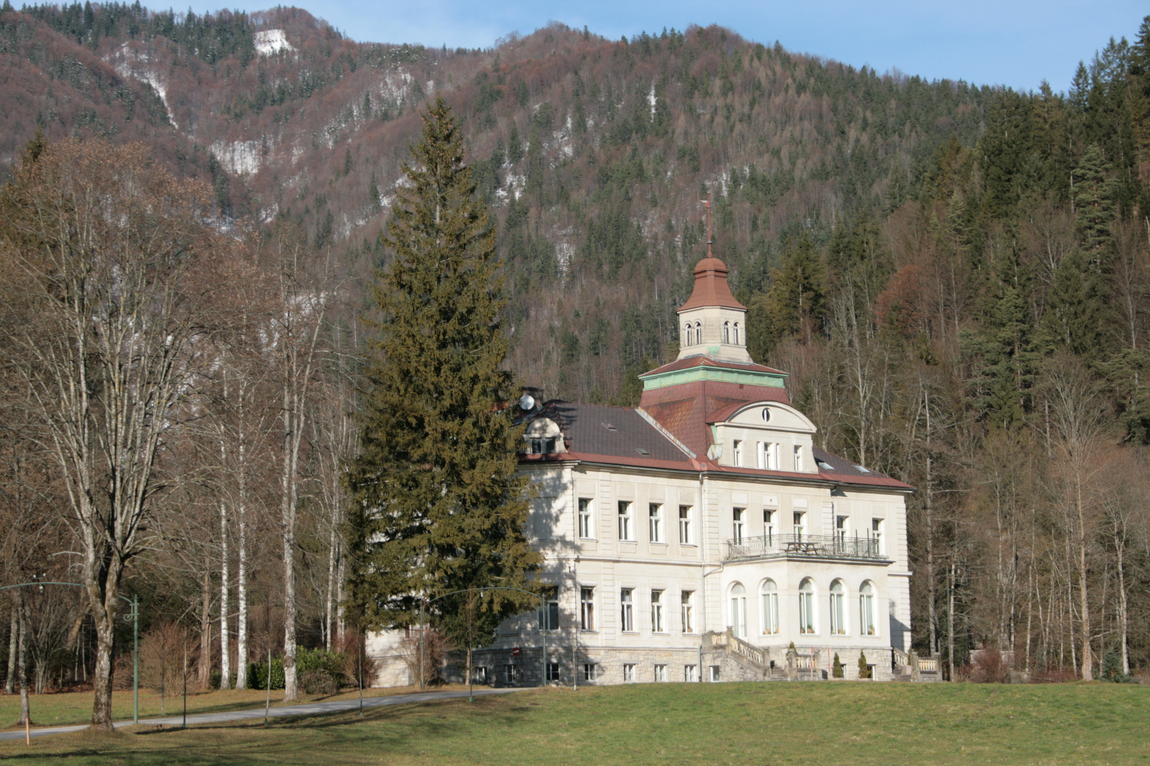 Schlossanlage Hohenlehen